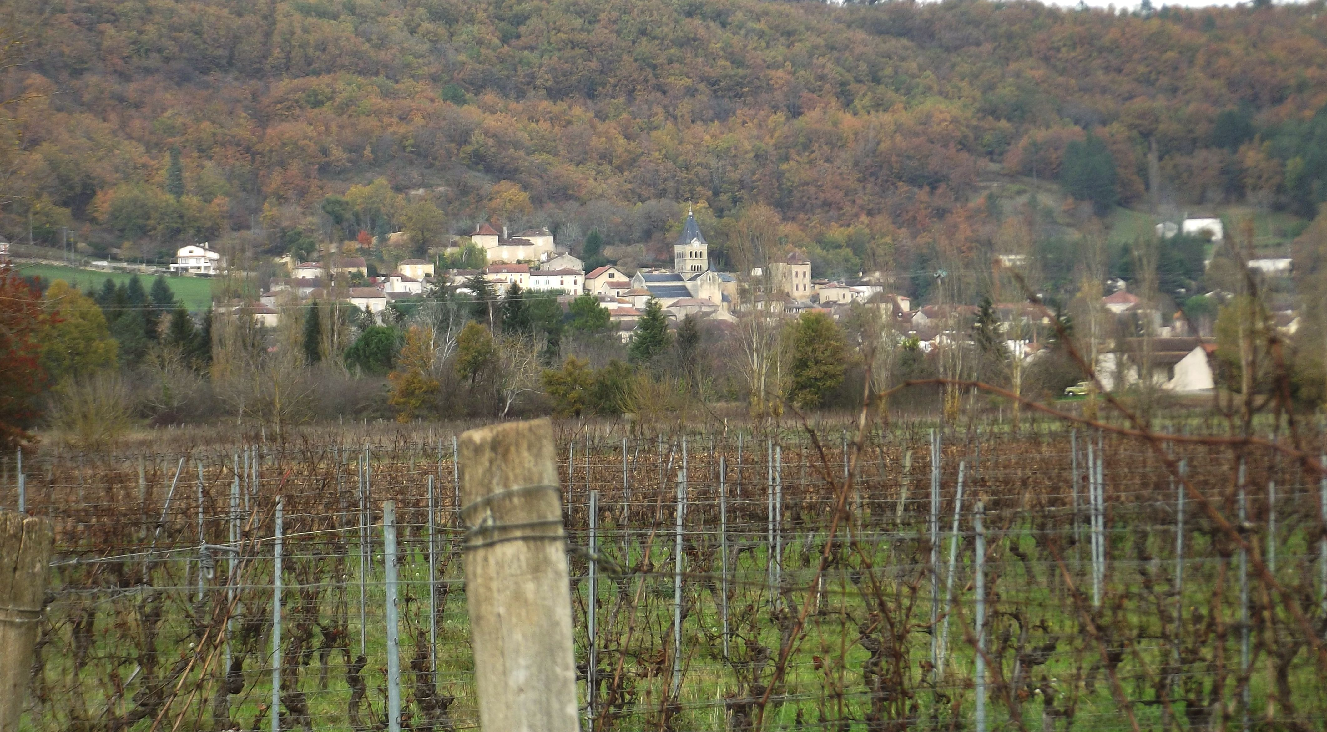 DURAVEL, Les Vignes et le Village